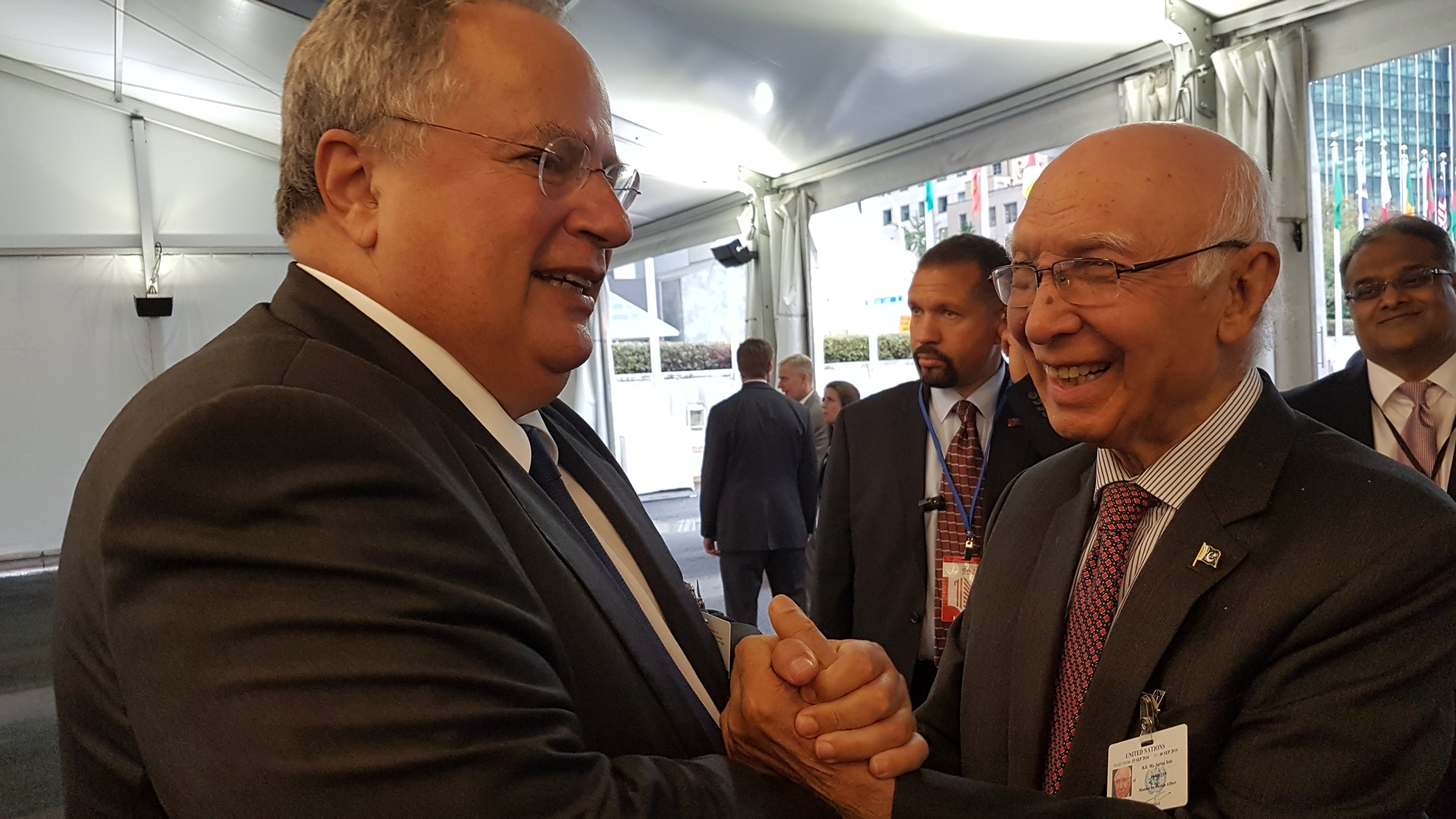 Στο πλαίσιο της Εβδομάδας Υψηλού Επιπέδου της 71ης Συνόδου της Γενικής Συνέλευσης του ΟΗΕ στη Νέα Υόρκη, ο Υπουργός Εξωτερικών, κ. Νίκος Κοτζιάς, συναντήθηκε με τον Muhammad Nawaz Sharif , Pakistan PM, Adviser on Foreign Affairs (Ν. Υόρκη, 19/9/16)